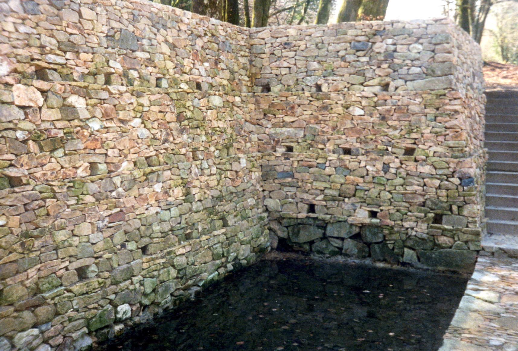 Reconstitution de la Fontaine ST Pierre à Bibracte, Bashar mai 2002, appareil photo personnel